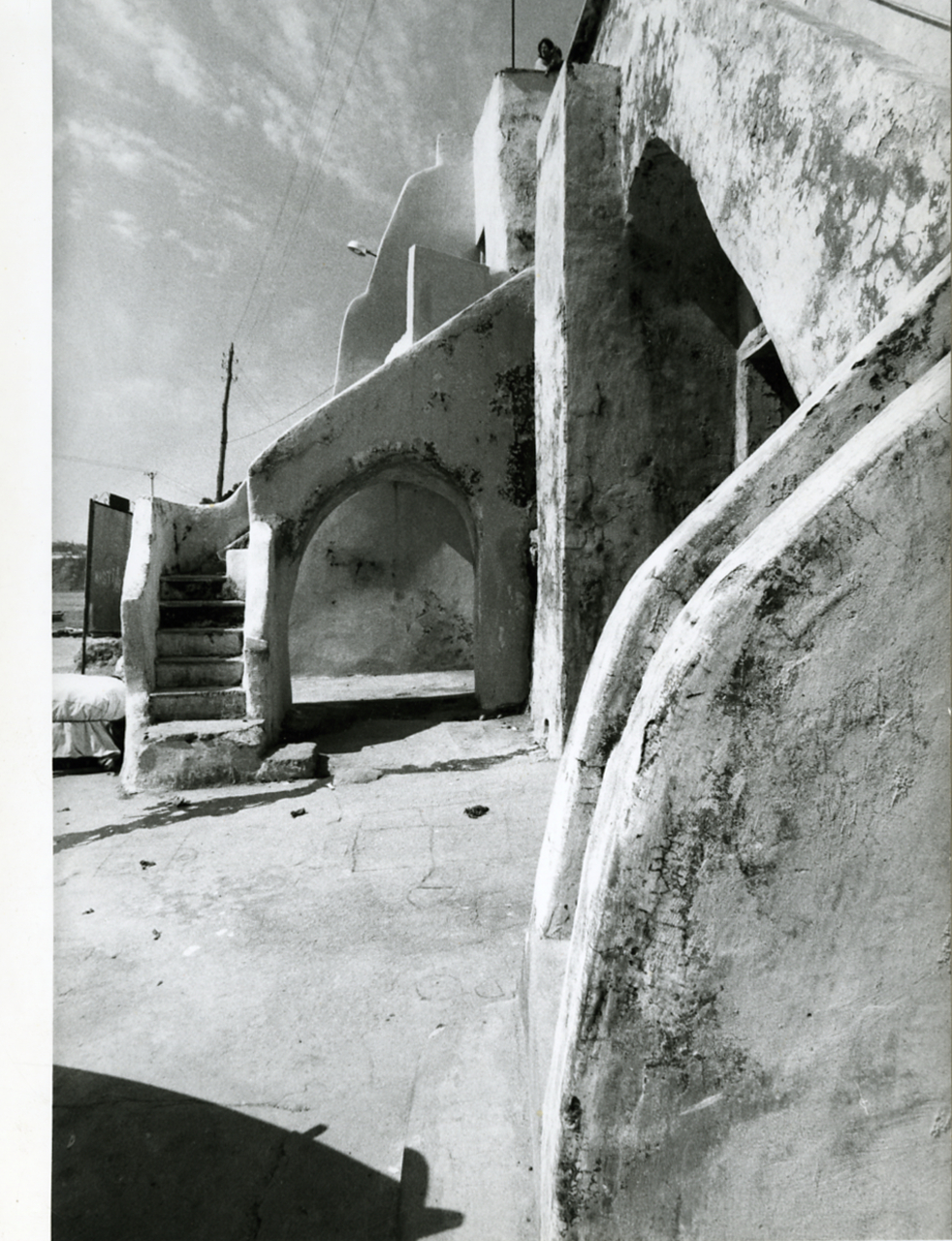 Procida (isola di). Architettura spontanea. Marina Corricella. Case di pescatori e scale di discesa al porto. Servizio fotografico : Procida, 1972 / Paolo Monti. - Stampe: 4 : Positivo b/n, gelatina bromuro d'argento/ carta, 18x24, 24x30. - ((Al verso delle stampe manoscritti i numeri dei negativi corrispondenti (formato 35 mm) con indicazione del fotogramma: 1890/3 (90/3), 1901/30 (lo stesso numero identifica 3 stampe - 3 copie). - Quando presente la numerazione altra è verosimilmente il riferimento al negativo corrispondente, scritto in forma abbreviata. - timbro a inchiostro con copyright: "© Copyright/ Credit to/ Paolo Monti/ Corso Sempione [...]/ Milano". - Sul coperchio della scatola iscrizione didascalica manoscritta a pennarello nero: "Procida". - Occasione: Documentazione per uno studio fotografico sull'architettura dell'isola (non pubblicata). - Fonte: Quaderno di Paolo Monti: Leica 1501-3000 Controllo numerazione (1950-1978), presso Archivio Paolo Monti. - Fonte: Quaderno di Paolo Monti: Monti - Agenda 1972 (1972/04/01), presso Archivio Paolo Monti. - Fonte: Lettera di Paolo Monti: XII. Documenti vari 1982-2000/ Procida (1968), presso Archivio Paolo Monti. Corrispondenza tra l'Architetto Giancarlo Cosenza e Paolo Monti sul progetto di pubblicazione di uno studio fotografico sull'architettura dell'isola di Procida